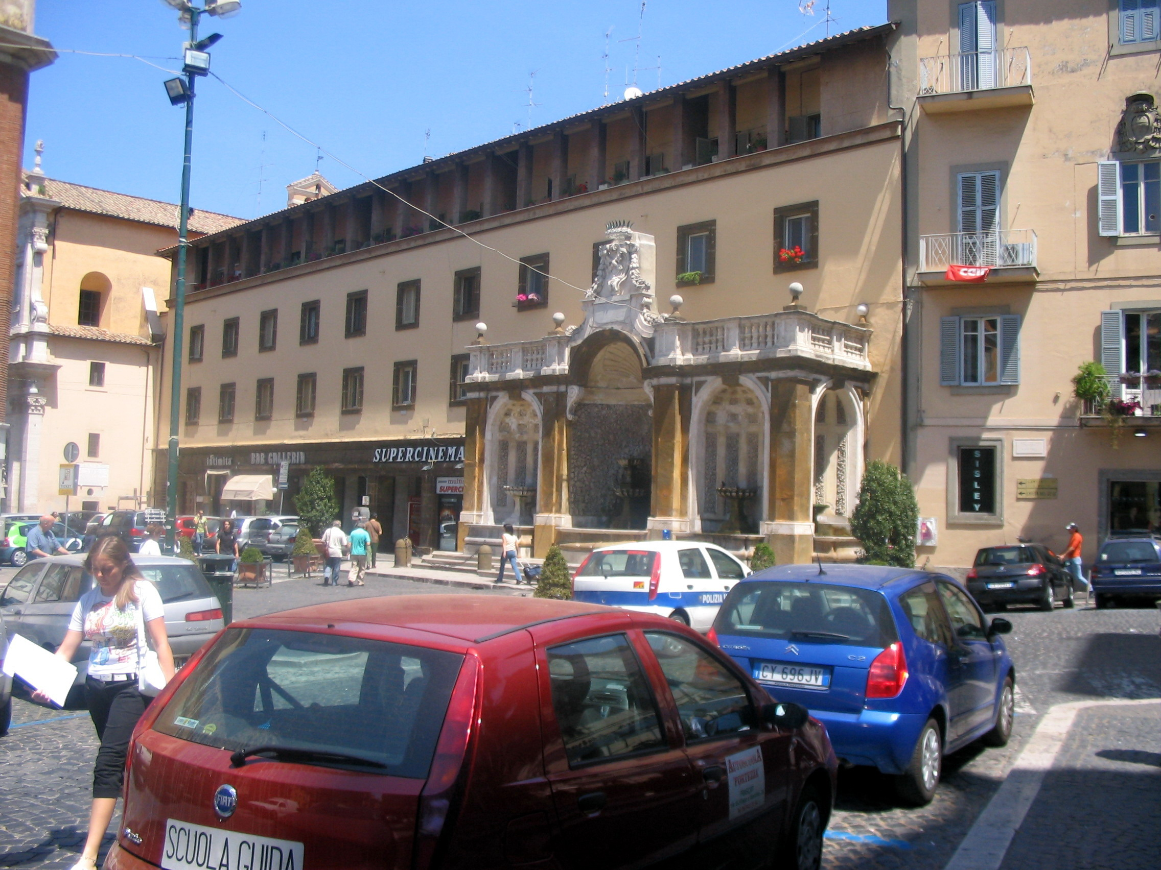 Frascati, Lazio, Italia